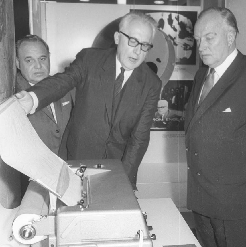 Dr.-Ing. Rudolf Hell auf der Ausstellung "TELECOM - Fortschritt für alle" in der Sonninhalle des Schlosses mit dem Präsidenten der Oberpostdirektion (OPD), Gerhard Kretschmann (rechts).